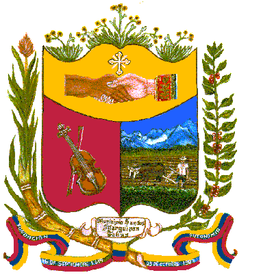 Escudo del Municipio Santos Marquina. Estado Mérida. Venezuela